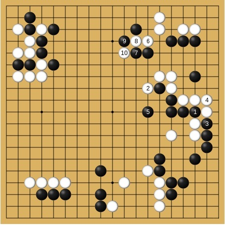 1958年9月1-2日 第13期本因坊戦挑戦手合七番勝負第6局 高川秀格(先番)-杉内雅男 65-74手目